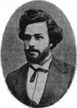 Anton Feliksovic Taksis (1852–?)